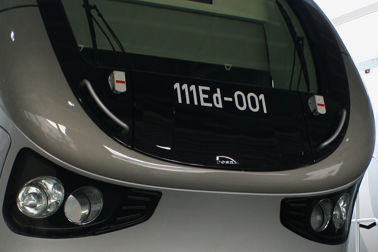 Oznaczenie na czole elektrowozu 111Ed-001.